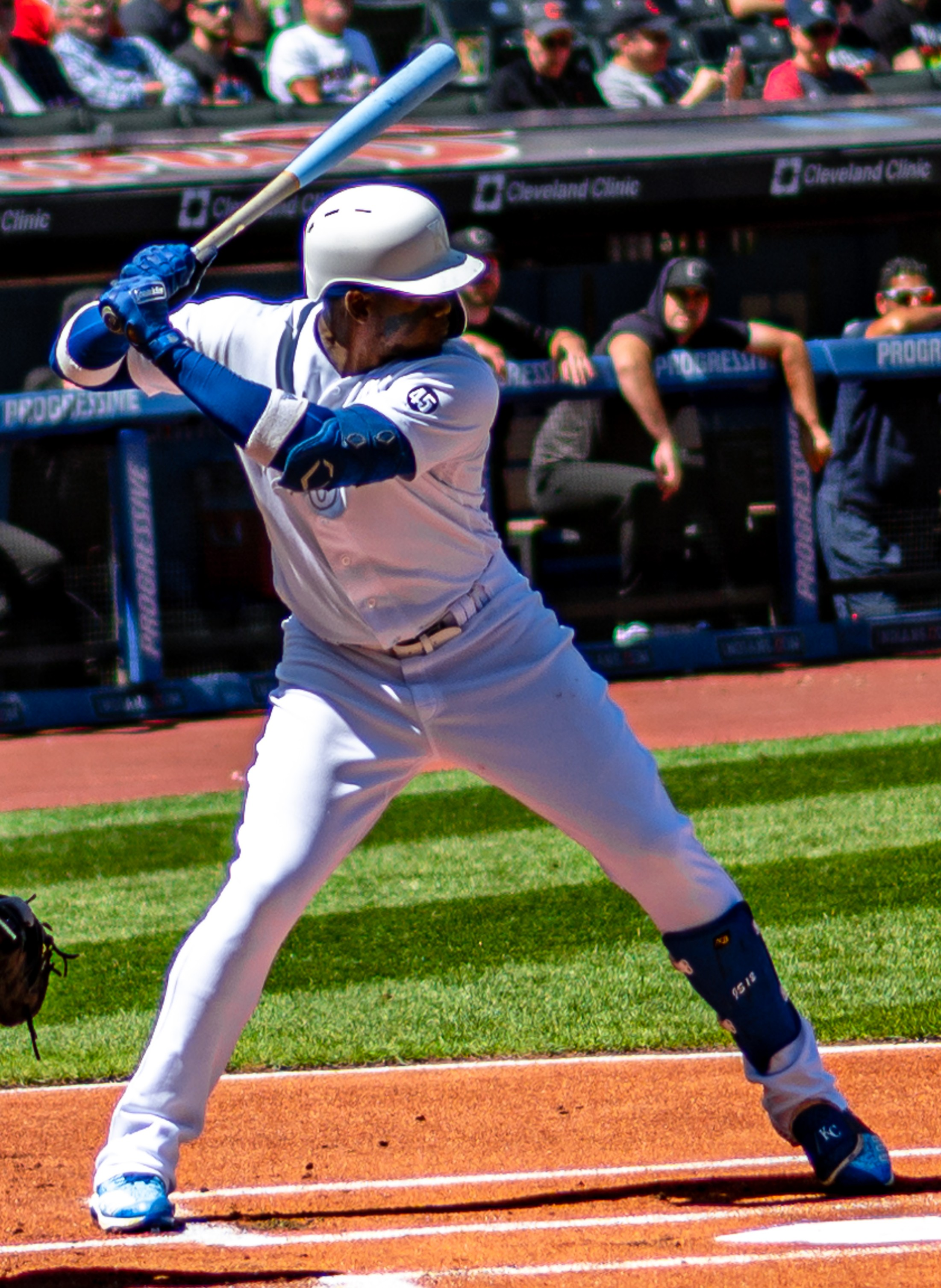 Kansas City Royals VS. Cleveland Indians